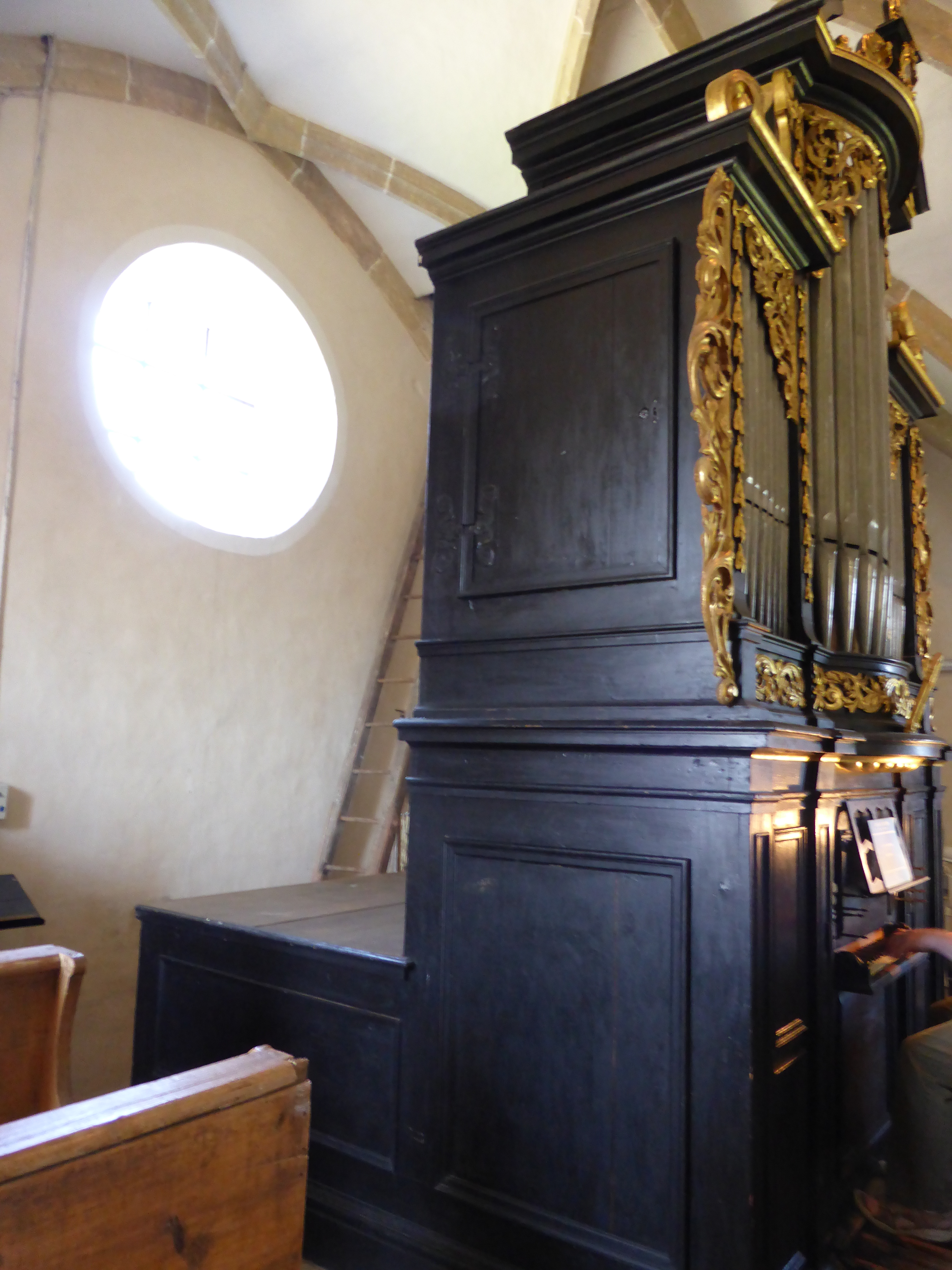 Johann Christoph Egedacher Orgel 1712 Münsteuer